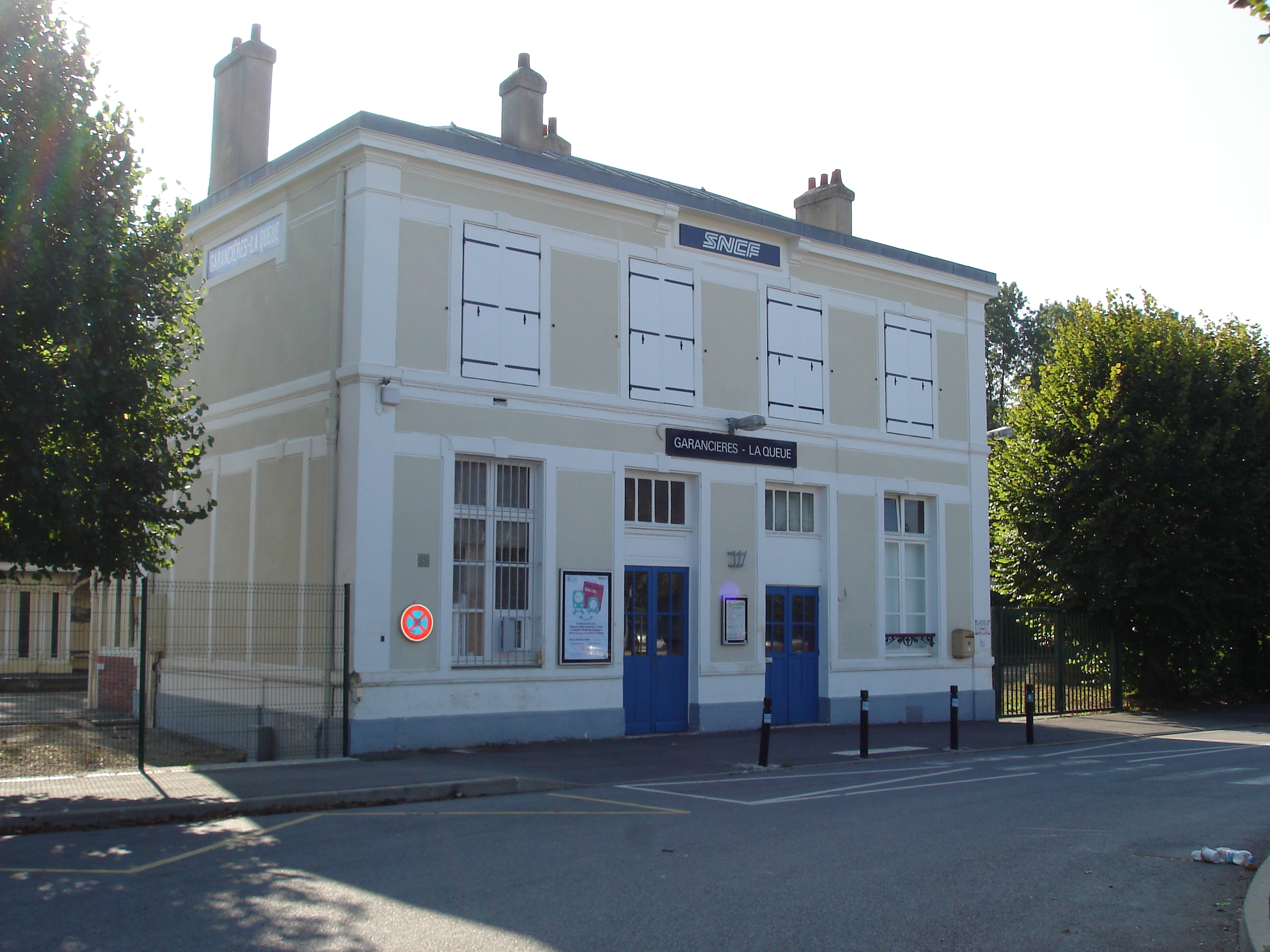 Gare de Garancières - La Queue (78) : Le bâtiment voyageurs.